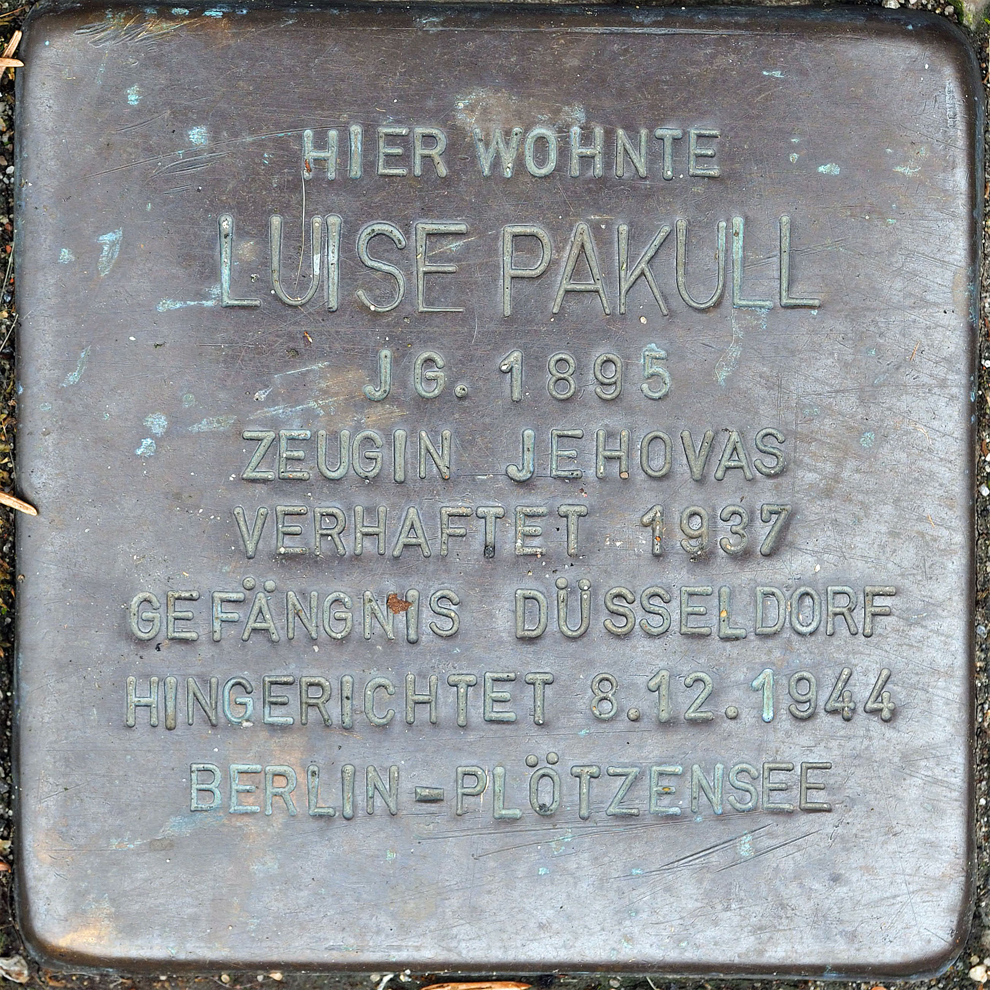 Stolpersteine MG: Pakull, Luise